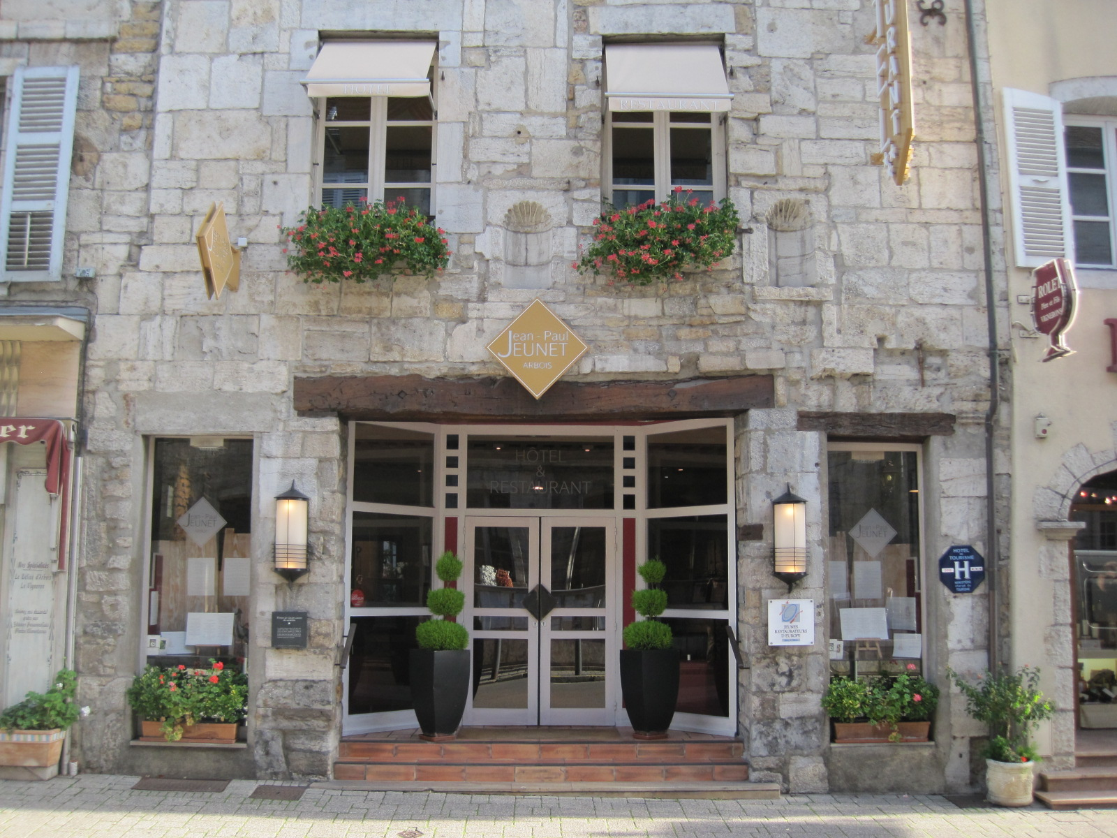 Facade du Restaurant Jean-Paul Jeunet à Arbois